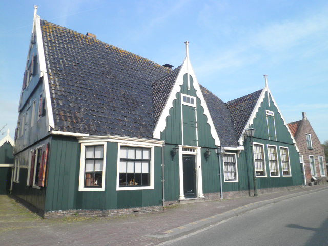 Houten huis, op zij voorzien van een tweemaal overgekraagde topgevel met uitgeschulpte windveren. Aan de straat twee topgevels met uitgeschulpte windveren, die steekkapellen afsluiten. Ingangsomlijsting met verdiepte pilasters